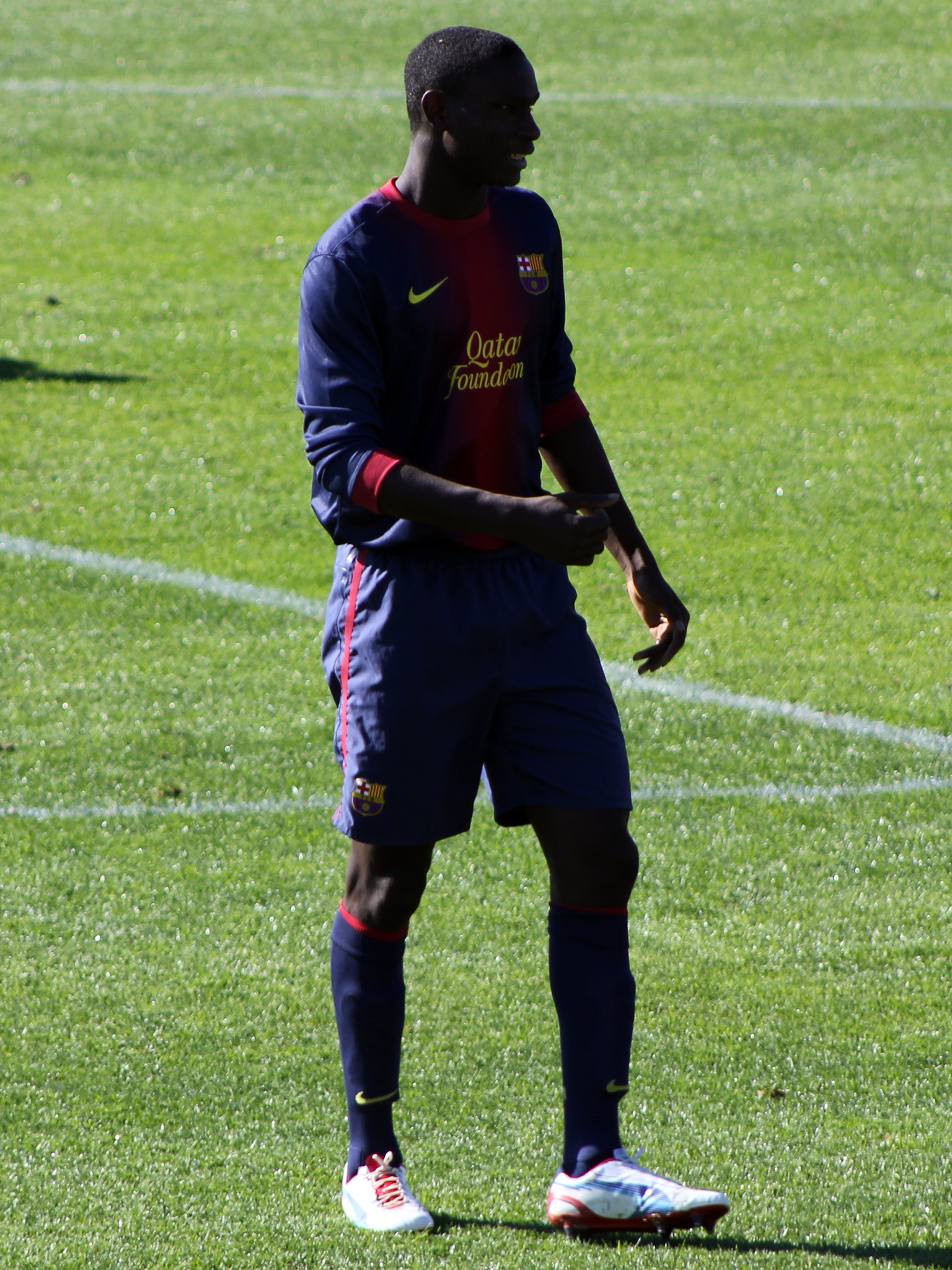 Foto realizada por Javier Segura (@castroquini)